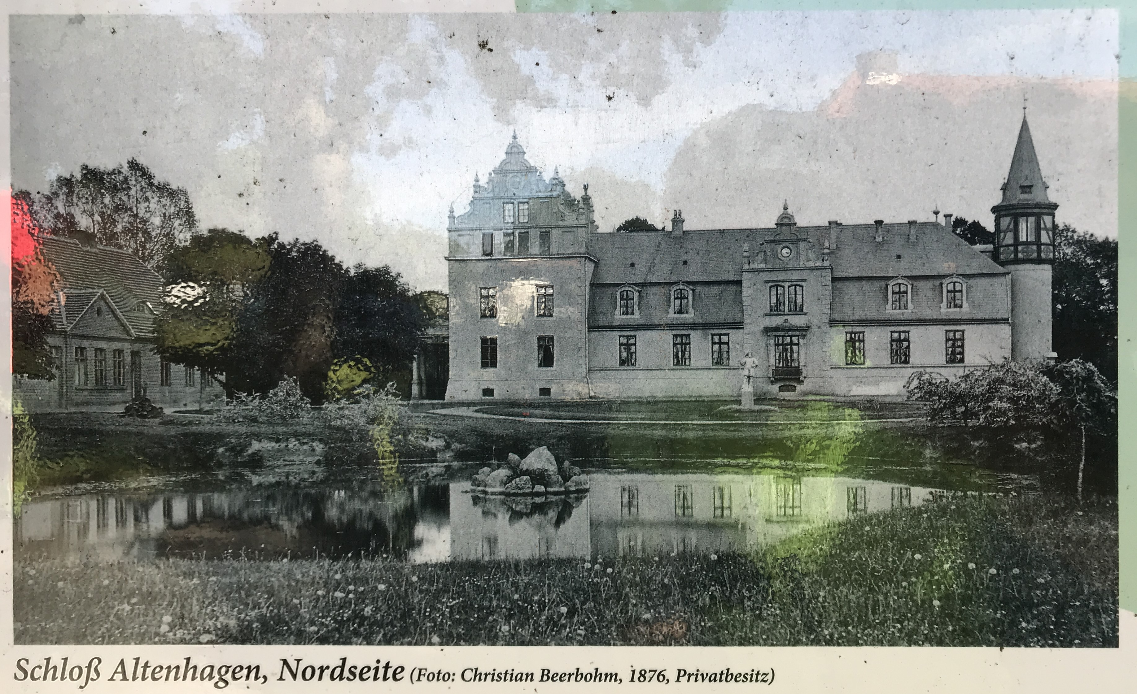 Historische Aufnahme des Gutshauses in Velgast-Altenhagen, Mecklenburg-Vorpommern. Die Aufnahme stammt von einer Informationstafel der Gemeinde, die öffentlich zugänglich an der Dorfstraße in der Nähe der Barthe aufgestellt ist.